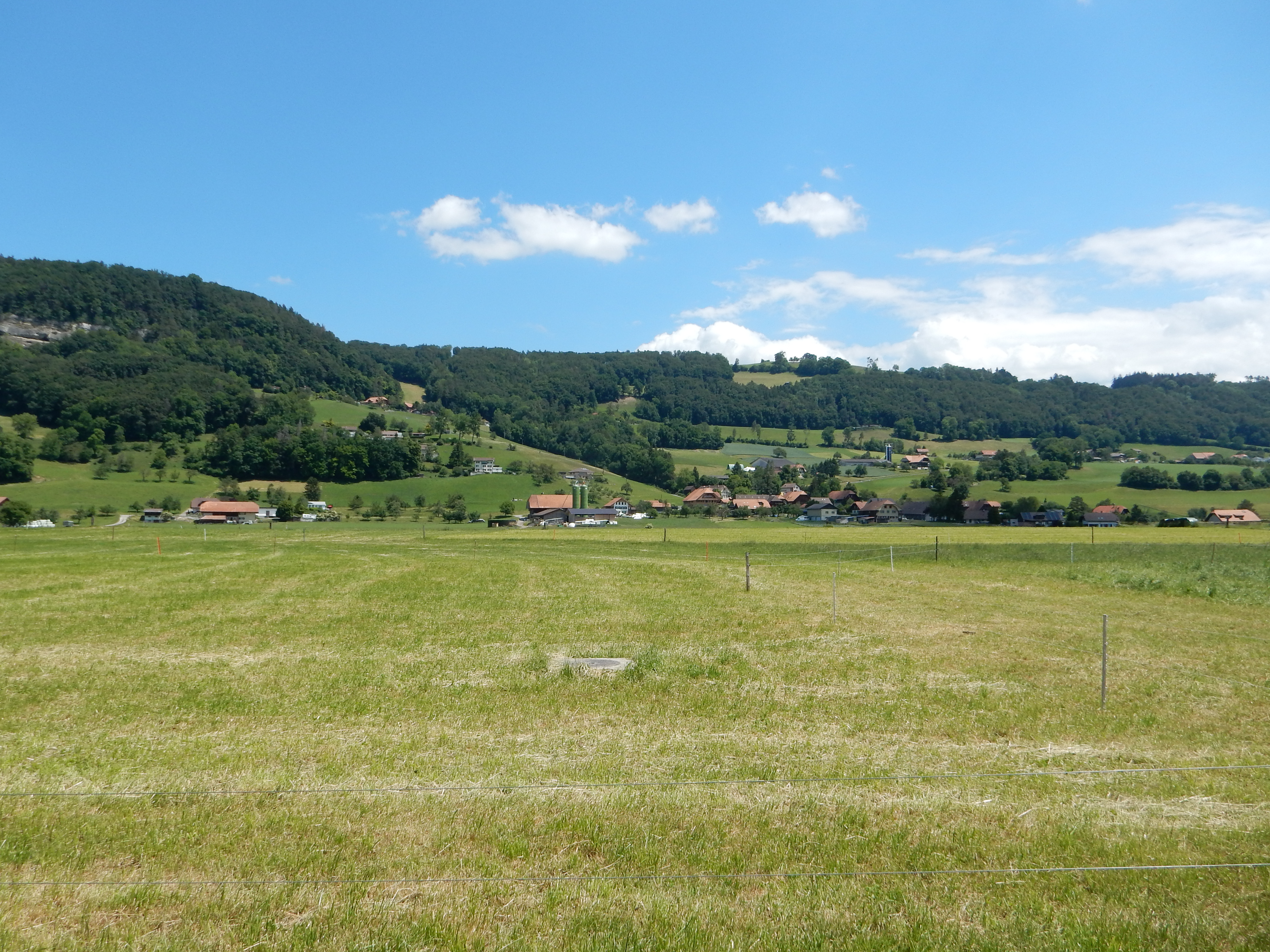 Gelterfingen (Kanton Bern, Schweiz)